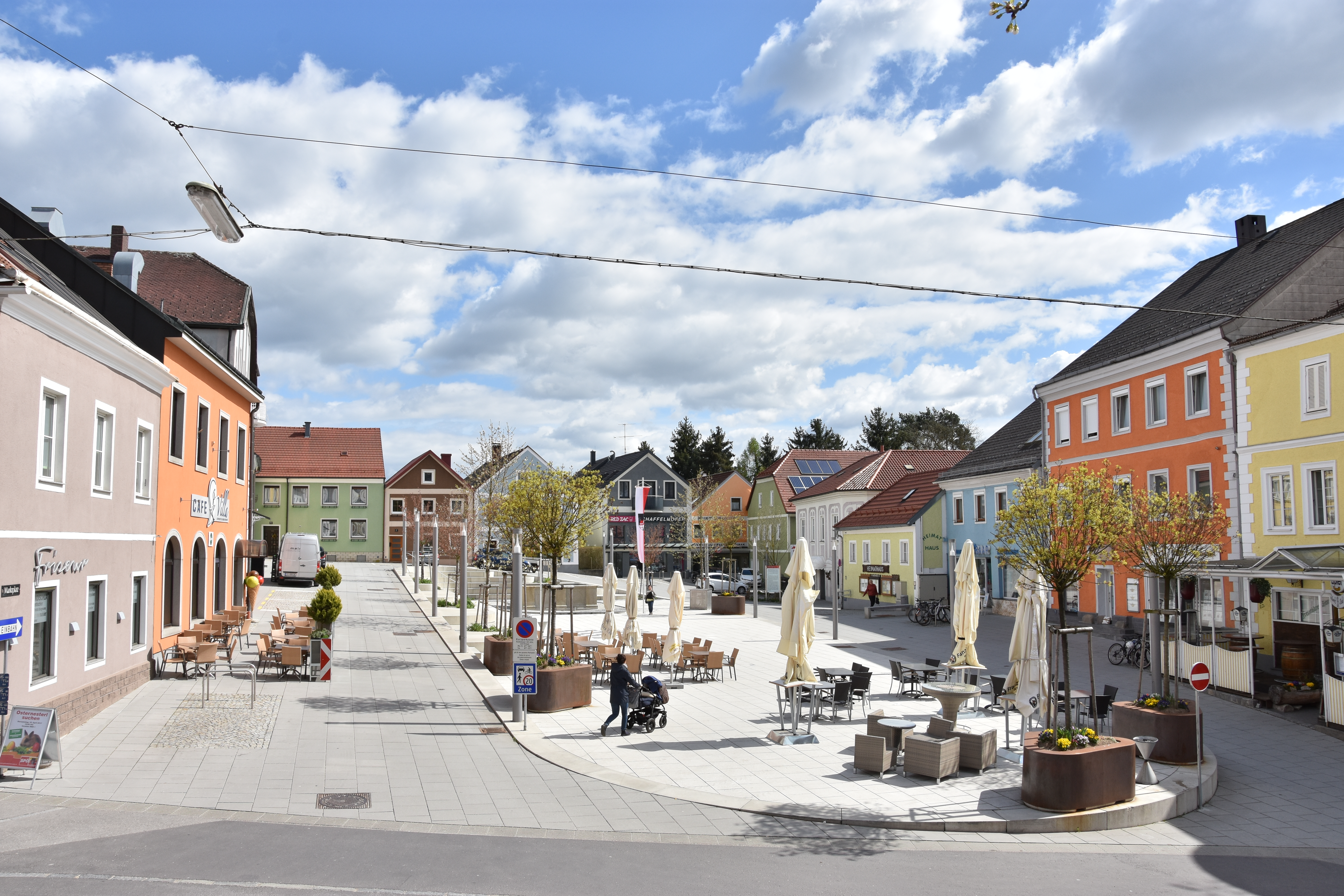 Nach der Renovierung 2015 erstrahlt der Marktplatz von Gallneukirchen als Ort für Begegnungen in neuem Glanz.